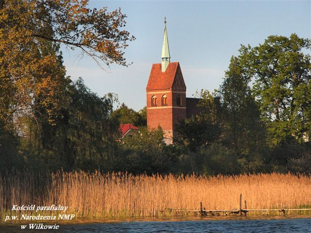 Widok na Kościół parafialny p.w. Narodzenia NMP w Wilkowie od strony jeziora wilkowskiego.